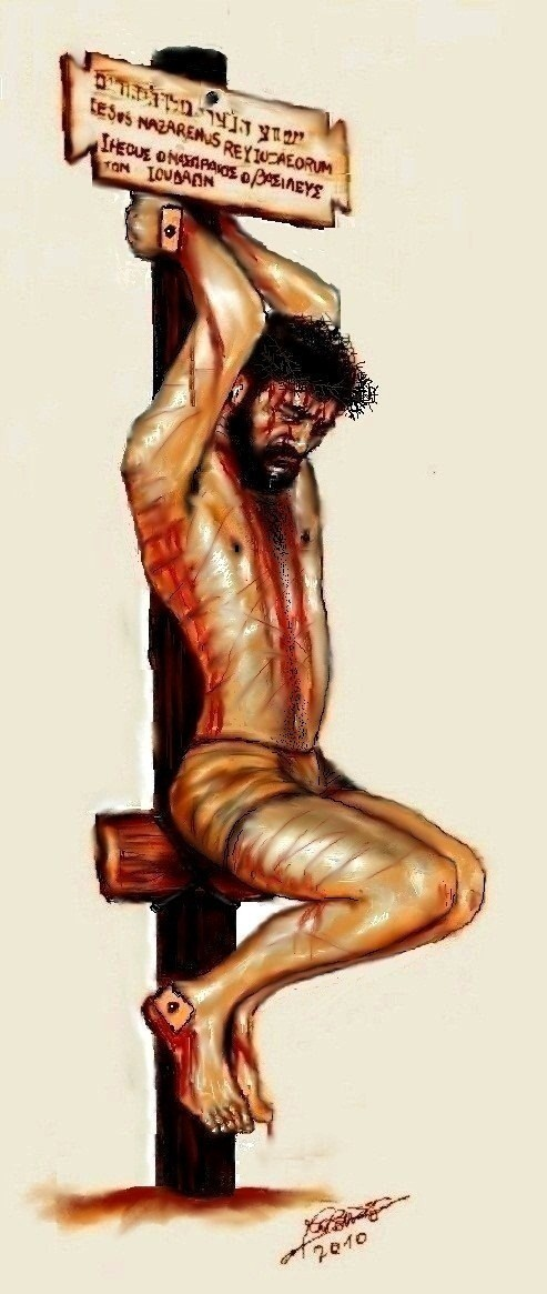 Representación artística de como habría sido la cruz de Cristo.